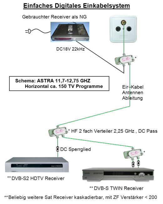 Einkabelsystem Nachrüstoption. (Kann mittels H104Plus o.ä. System für einen ORF HDTV Empfang sowie für weitere ARD Programme aus dem Astra Low Band erweitert werden). *ORF HDTV Empfang nur mit ORF Cryptoworwks Karte.